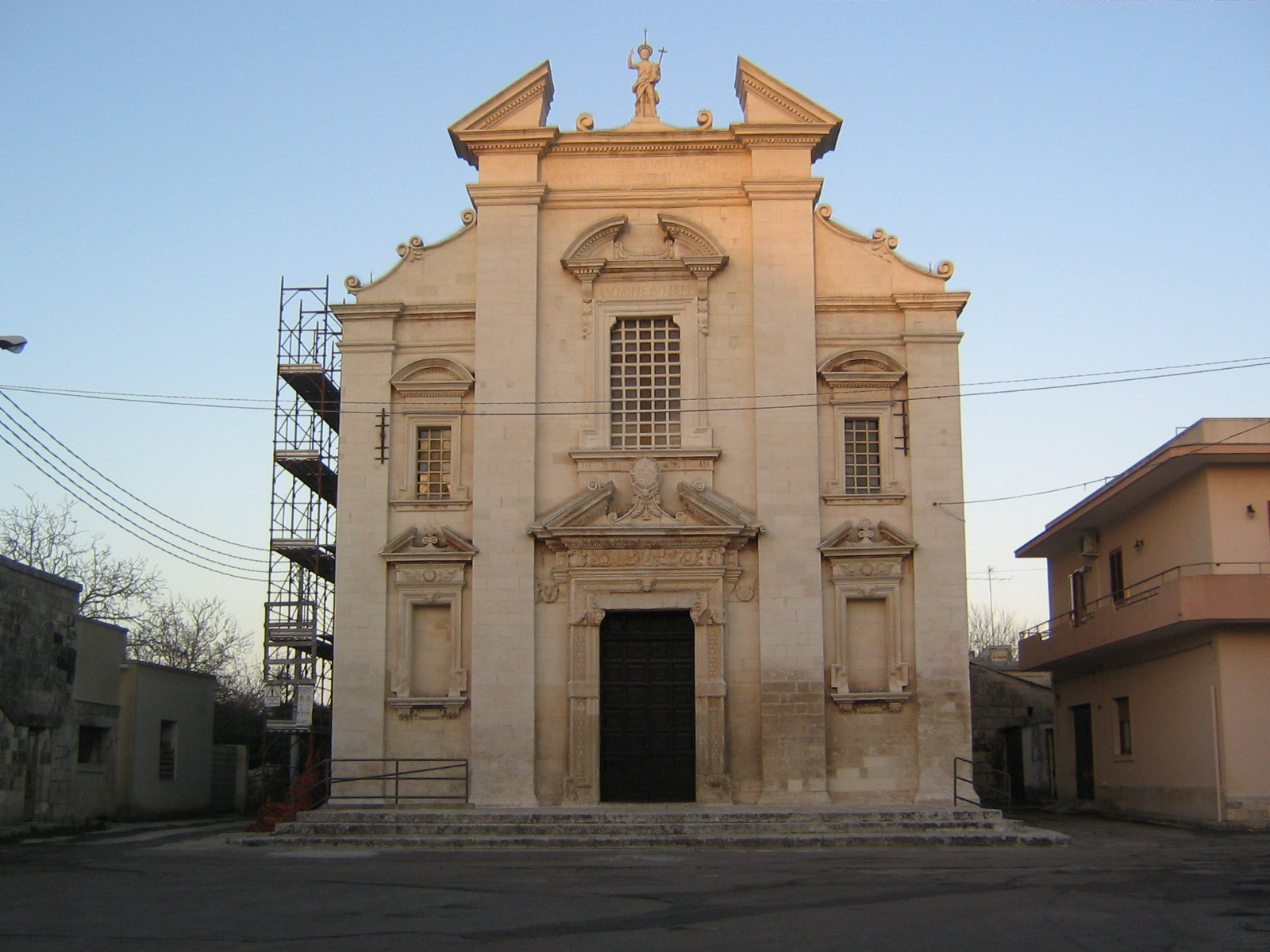 Chiesa Madre di San Giovanni Battista, Morigino, Maglie, Lecce, Italia